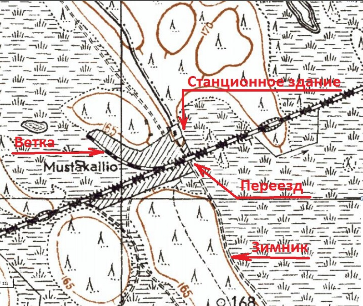 Мустакаллио.